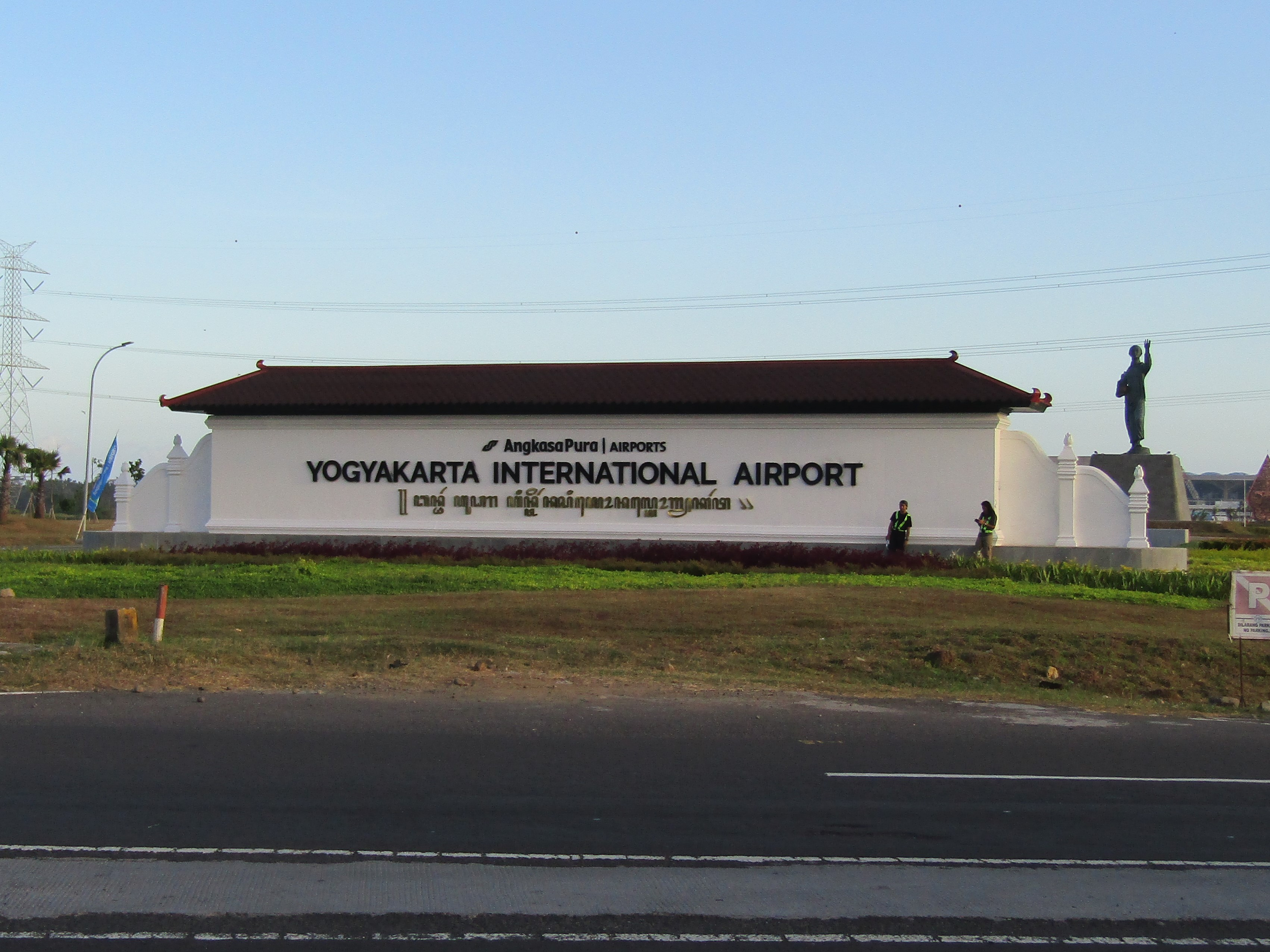 Tampak depan Bandara Internasional Yogyakarta dengan penanda nama berbentuk limasan, nama dalam bahasa Inggris, dan aksara Jawa